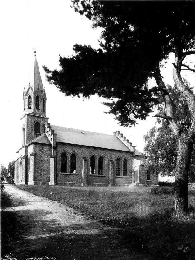 Nordstrand kirke 1929, før ombygging